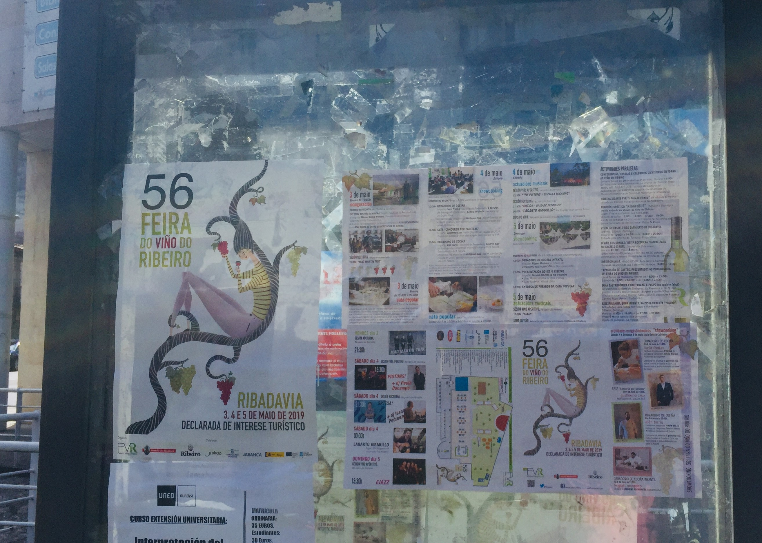 Cartel da 56 edición da Feira do Viño de Ribadavia no ano 2019